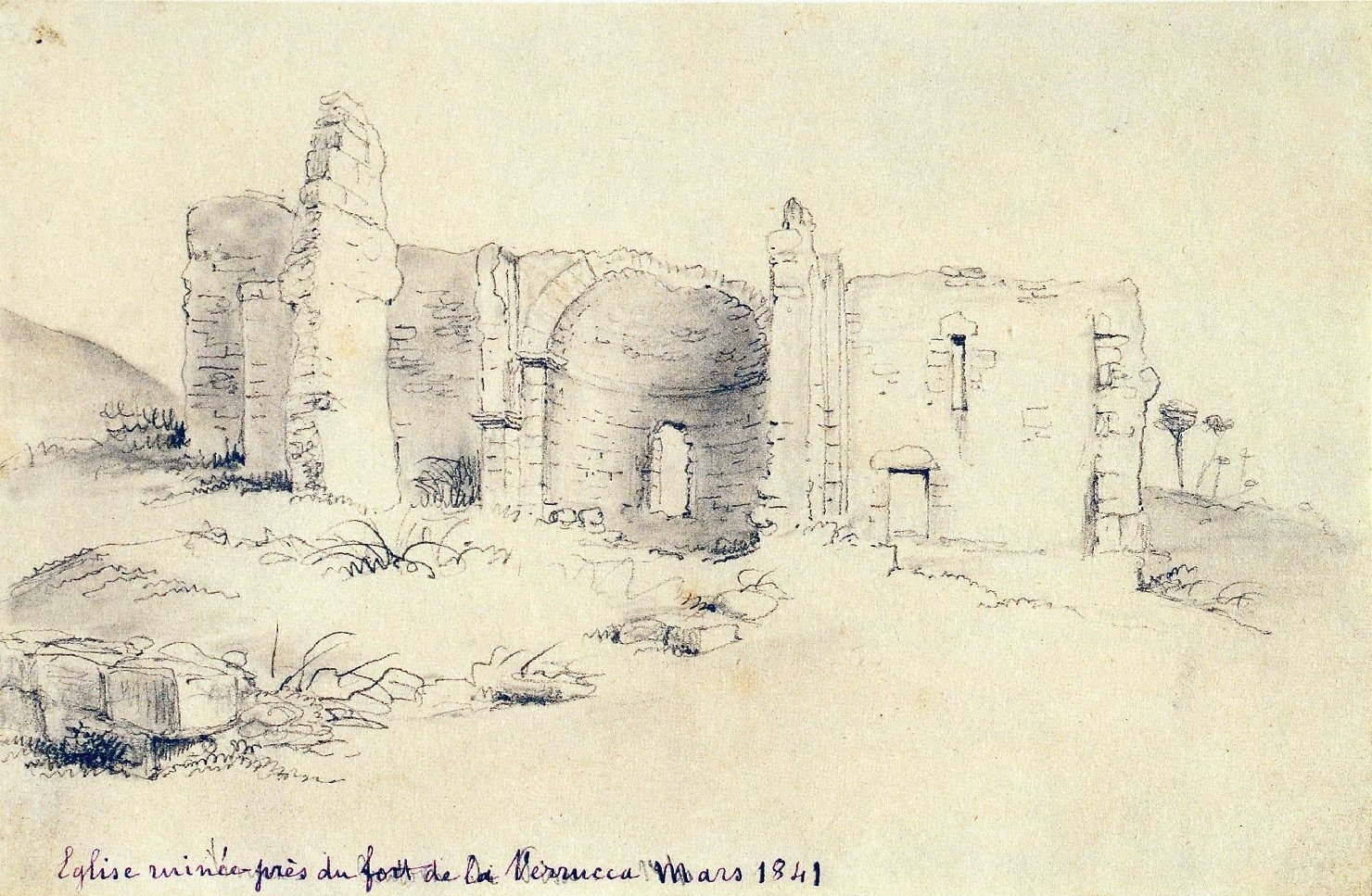 Resti della chiesa e monastero di San Michele alla Verruca, "Campagne pisane" di Mademoiselle De La Morinière, 1837